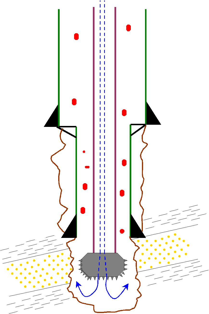 Eigen werk